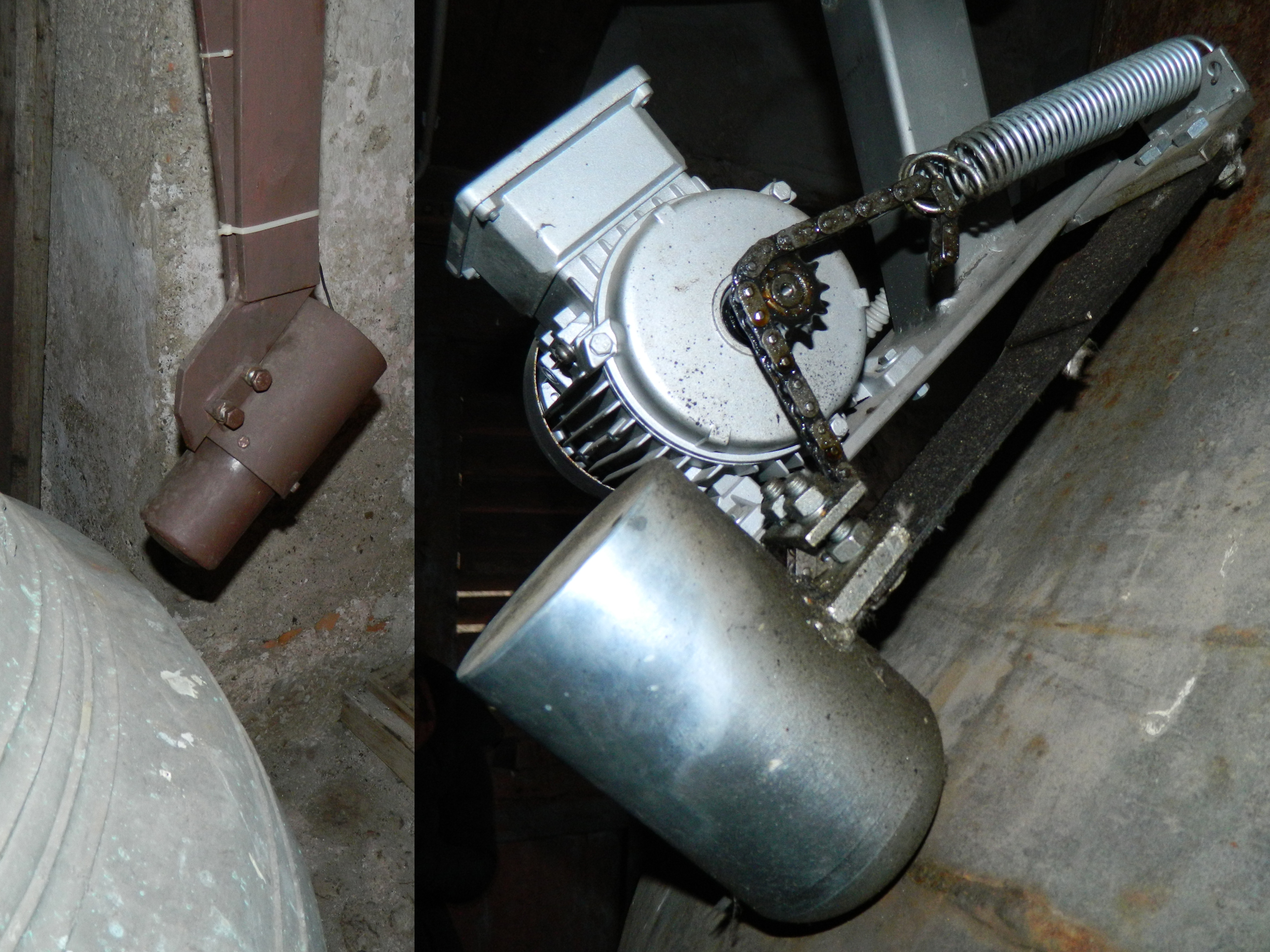 Dva primera urnih kladiv pri nas.